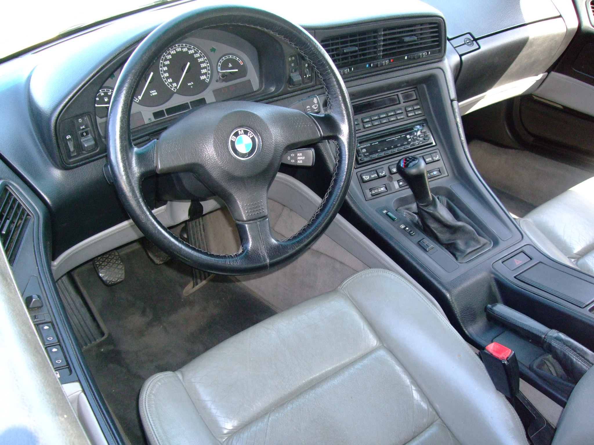 Wnętrze BMW 850i manual.